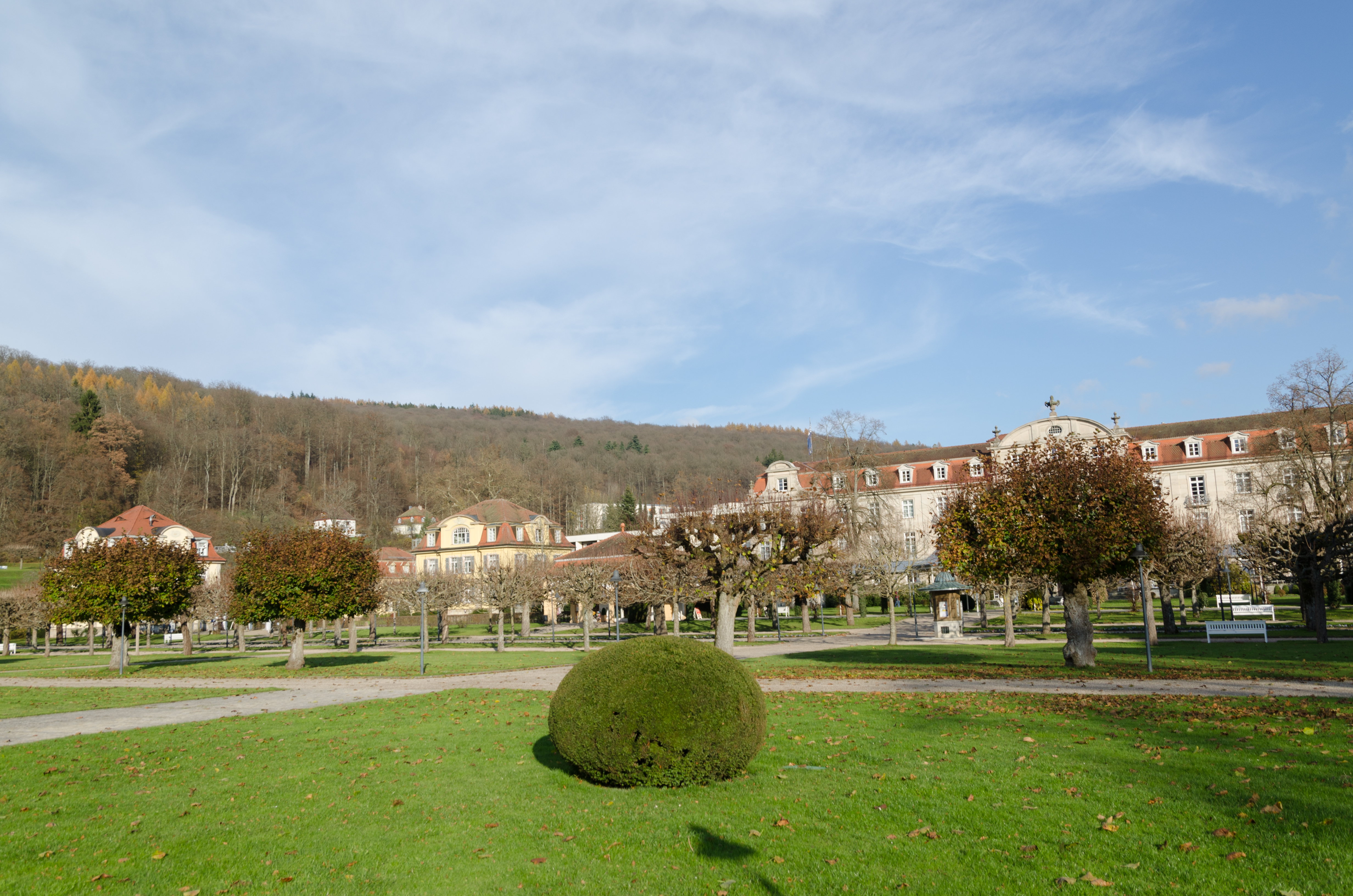 Bad Brückenau, Amand-von-Buseck-Straße, Kurpark